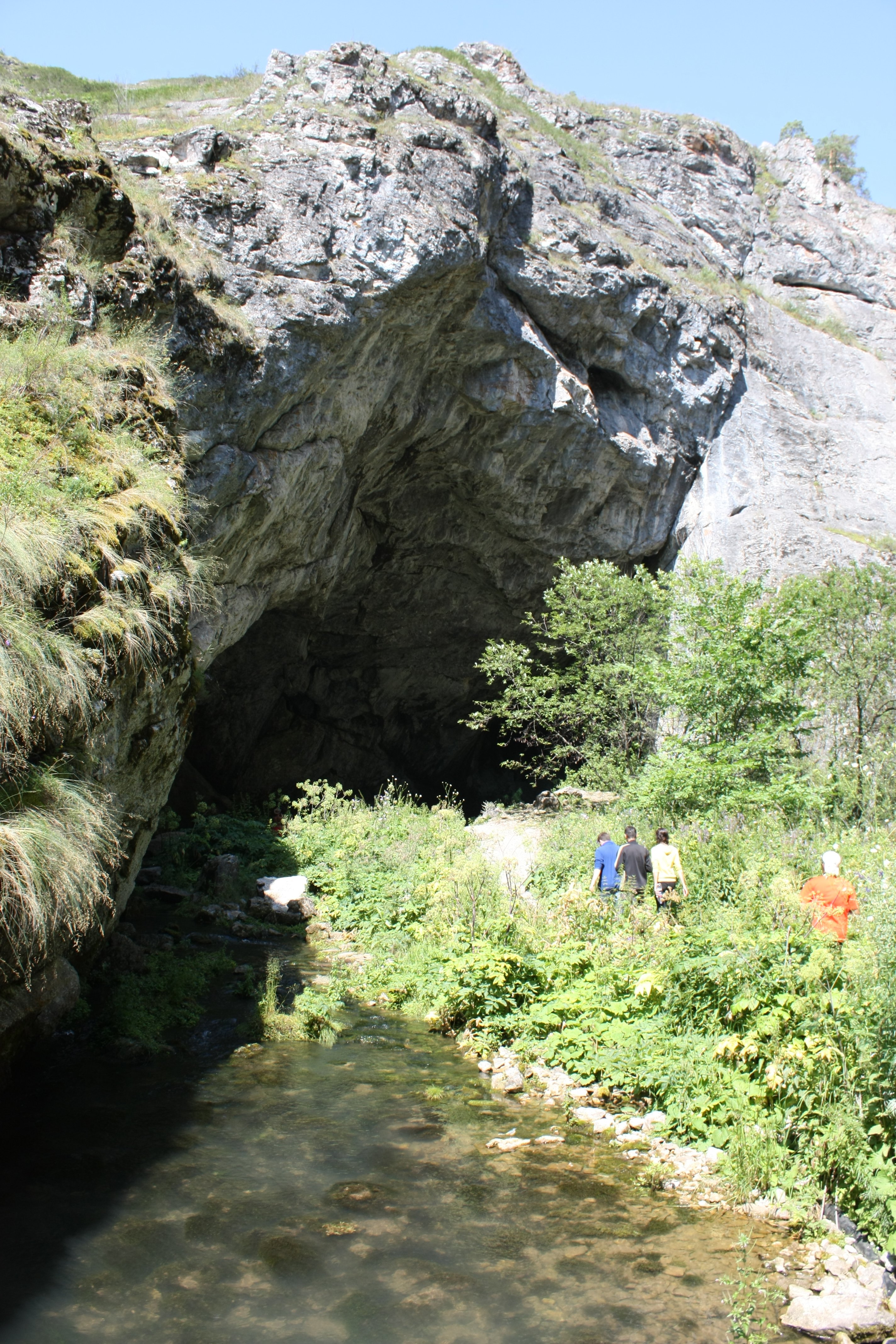 Капова пещера (Шульган-Таш), Бурзянский район This image is related to the protected area of Russia number 0220101